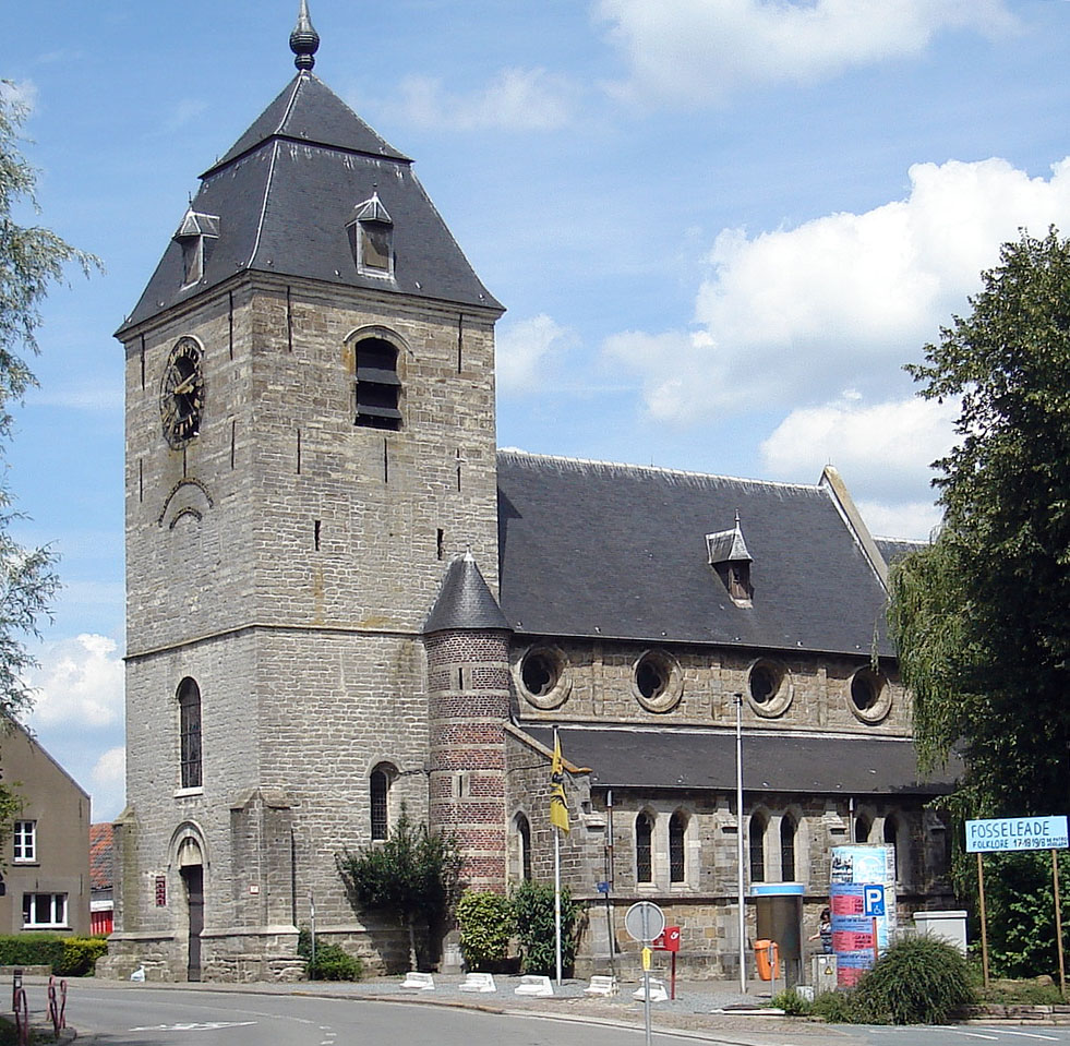 Church of Saint Michael (Sint-Michielskerk), Hekelgem, Belgium